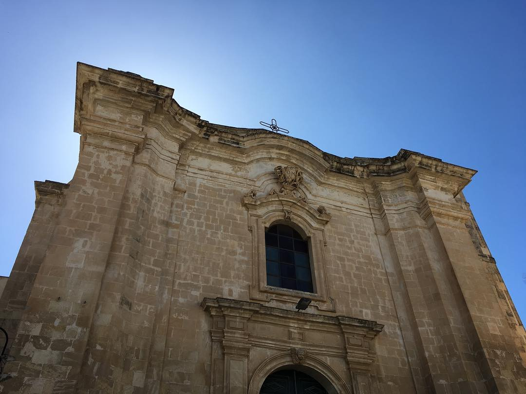 Chiesa di San Giuseppe - Scicli